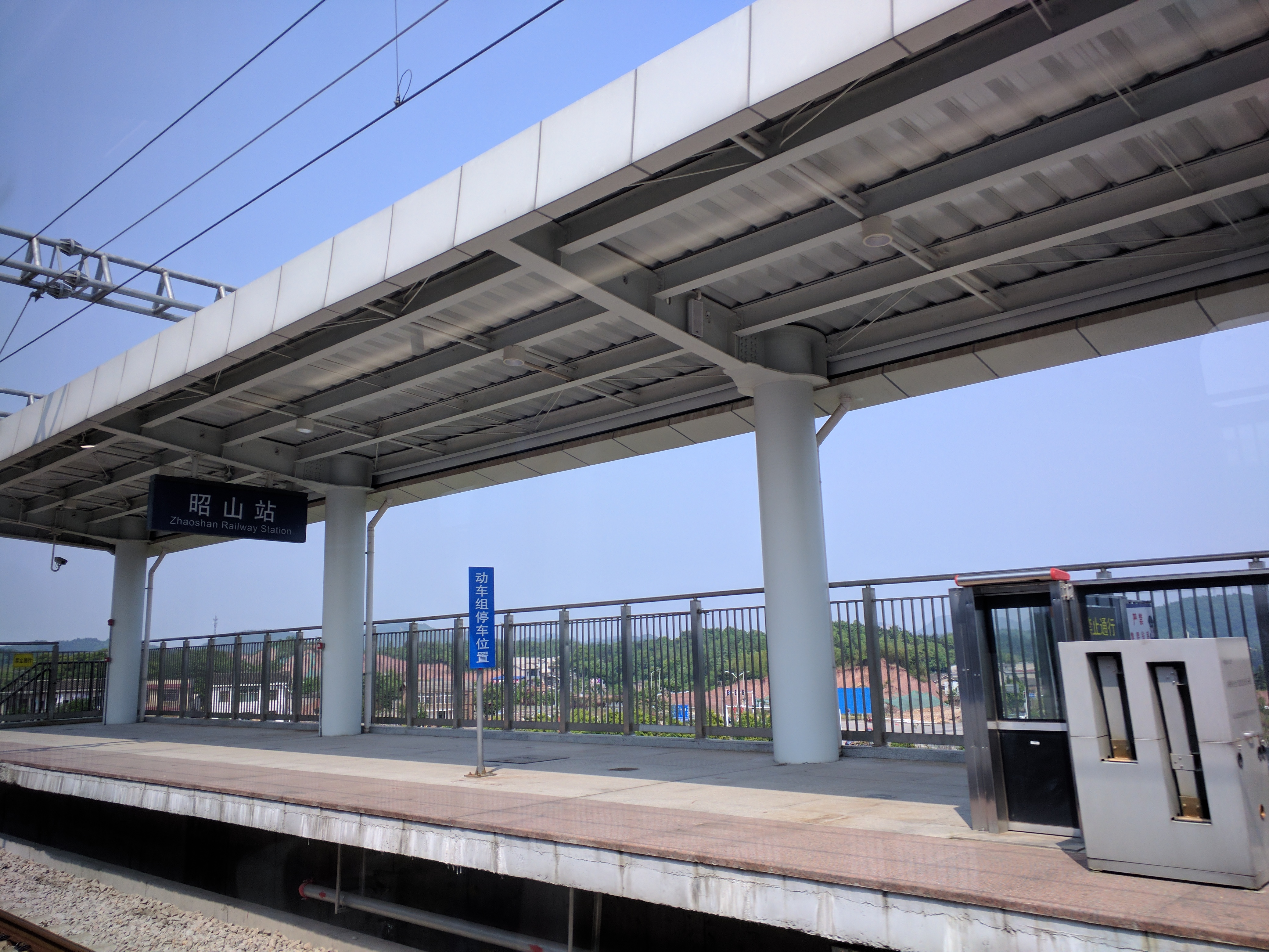 中文（中国大陆）: 长株潭城际铁路昭山站2站台